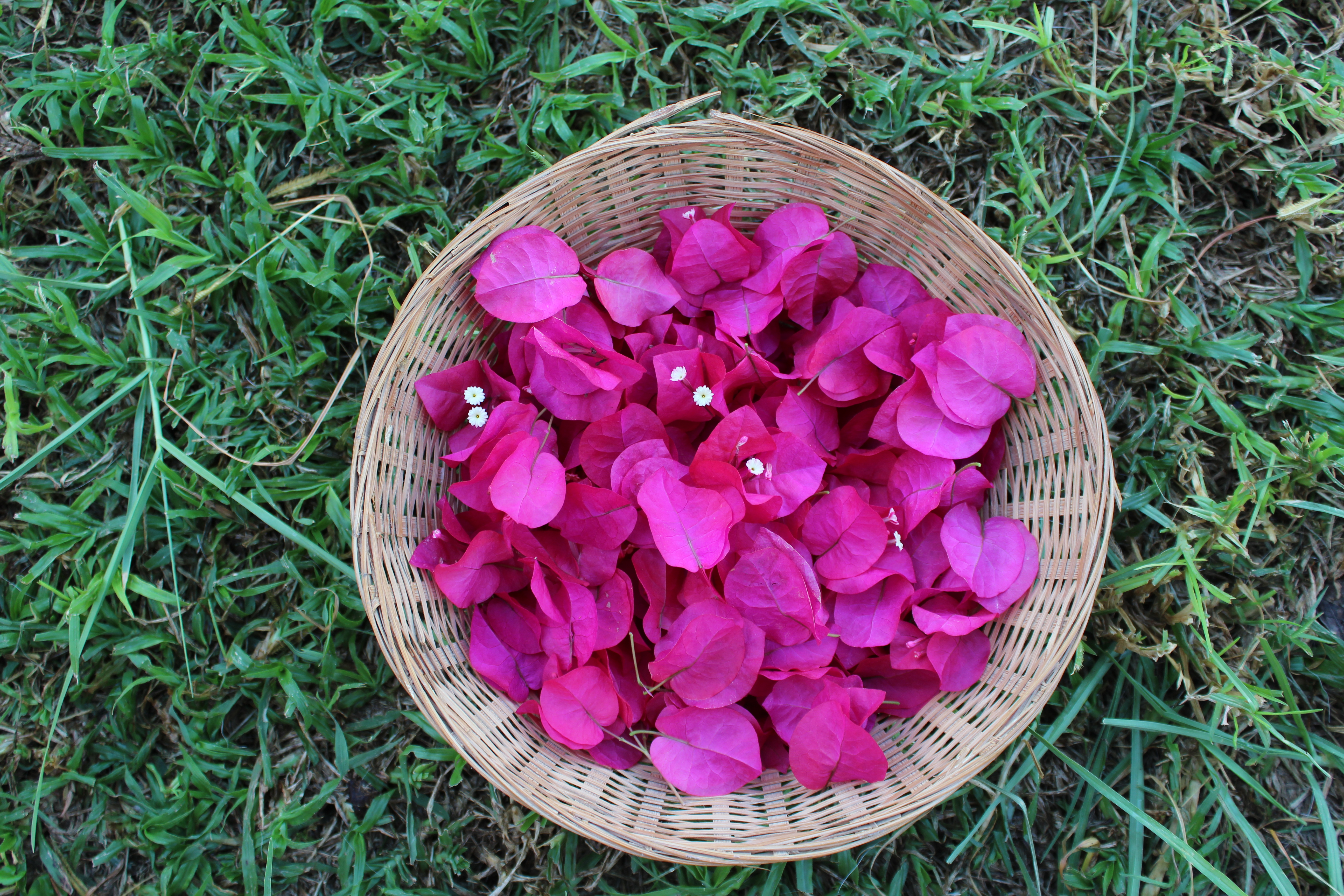 .בוגנוויליה בצבע ורוד שצולמה בתאורה טבעית